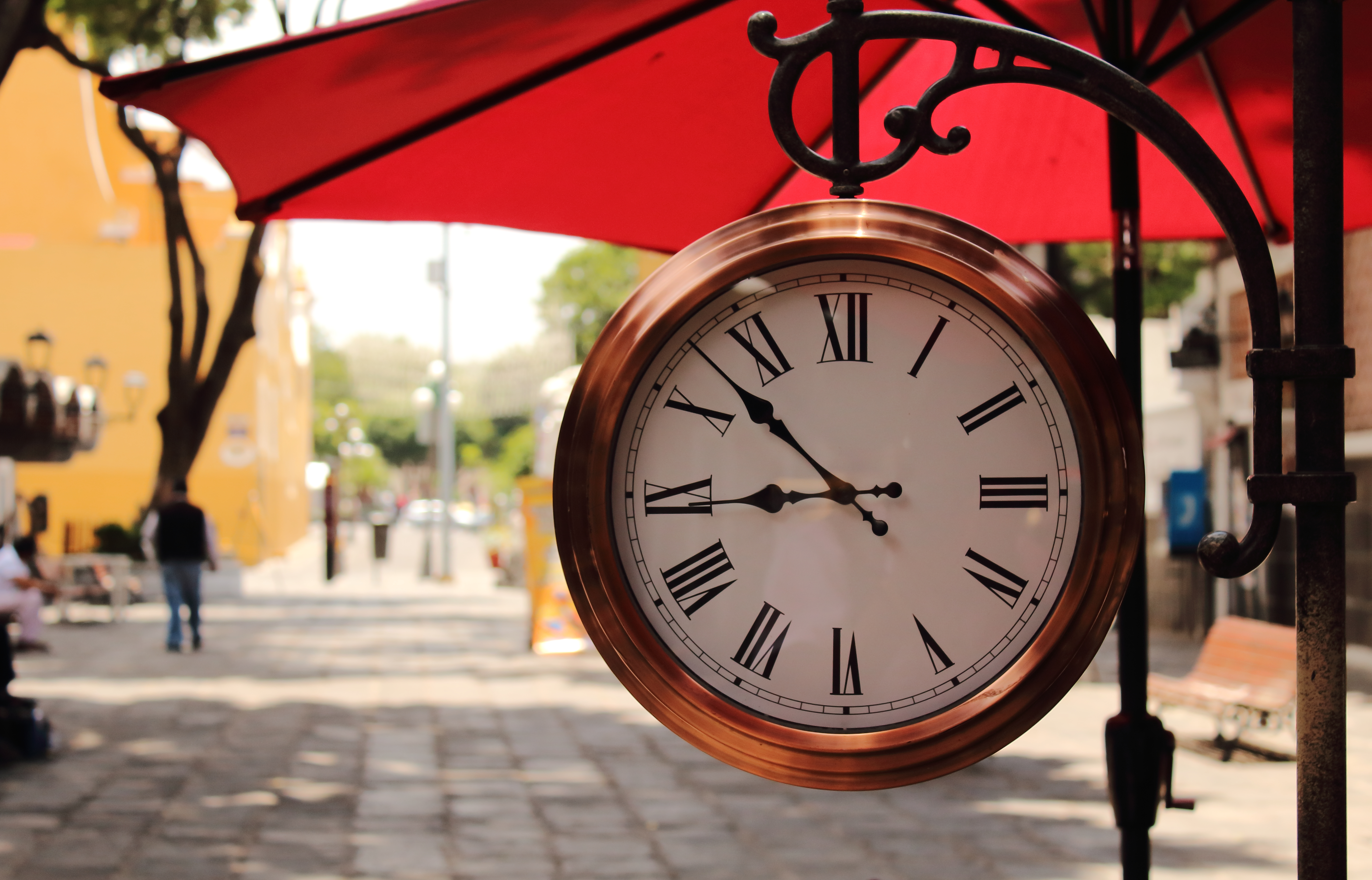 Reloj en el barrio del artista en Puebla, México.